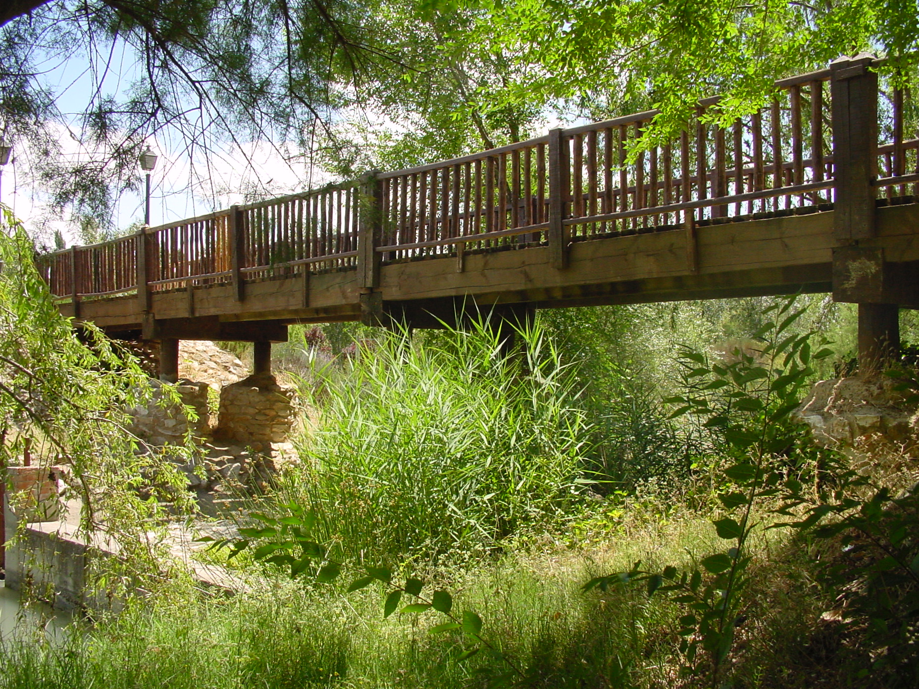 Puente en Villamanrique de Tajo.